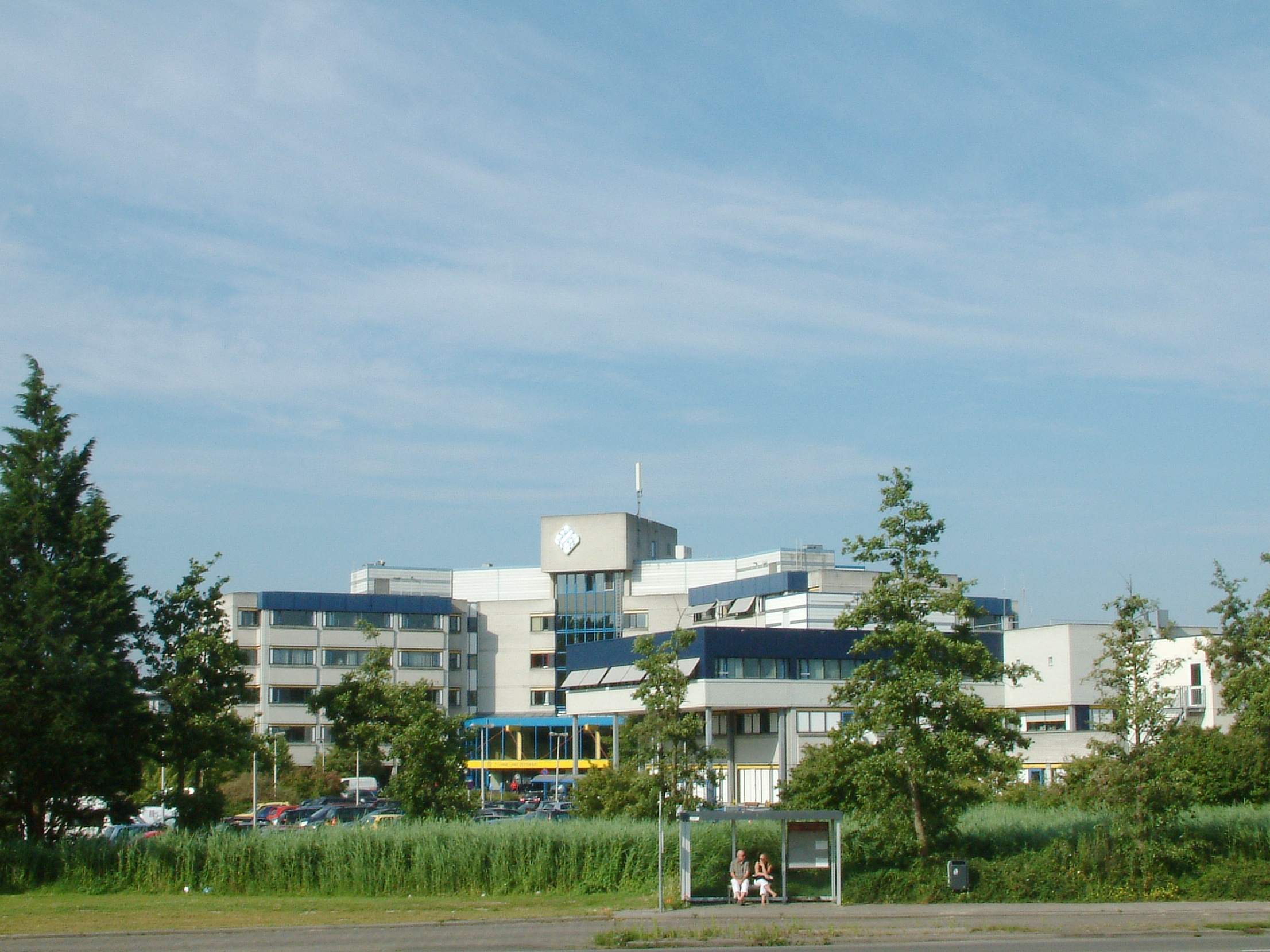 Bouwwerken in Zoetermeer